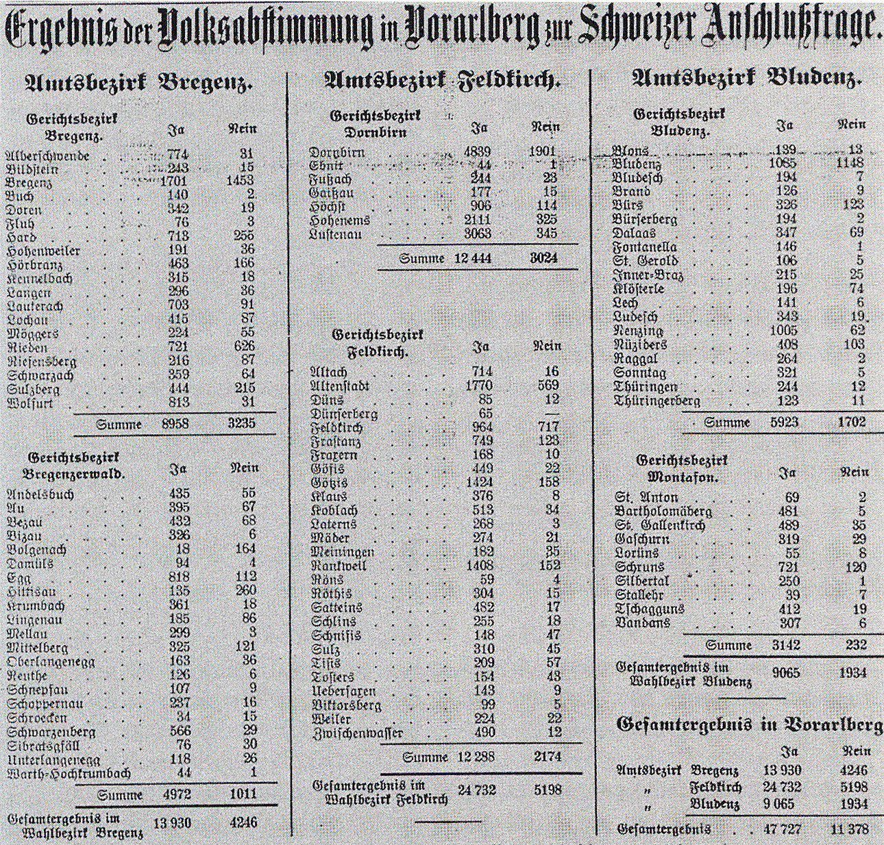 Ergebnis Volksabstimmung Vorarlberg 1919, publiziert im Vorarlberger Tagblatt vom 14. Mai 1919